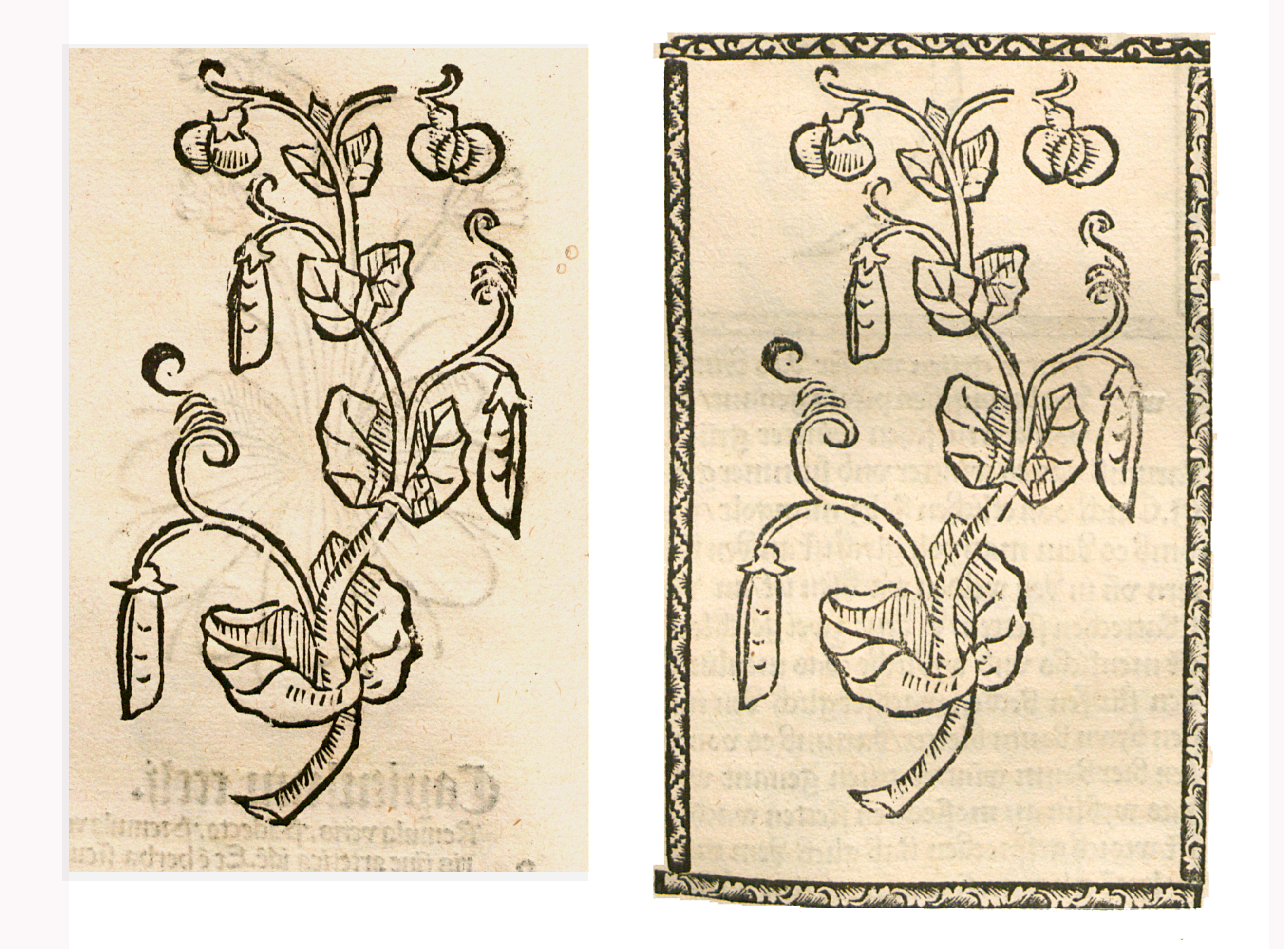 Abbildung von: Wyß Erbeiß (Pisum sativum)